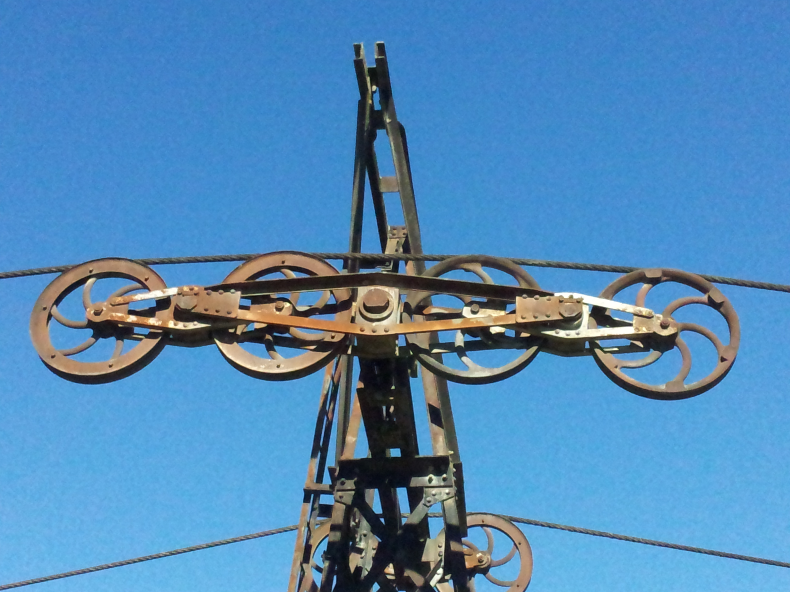 Détail du haut d'un pylône avec quatre poulies de l'ancien transporteur aérien Maxéville-Dombasle exposé à l'entrée de la carrière Solvay de Saint-Germain-sur-Meuse.